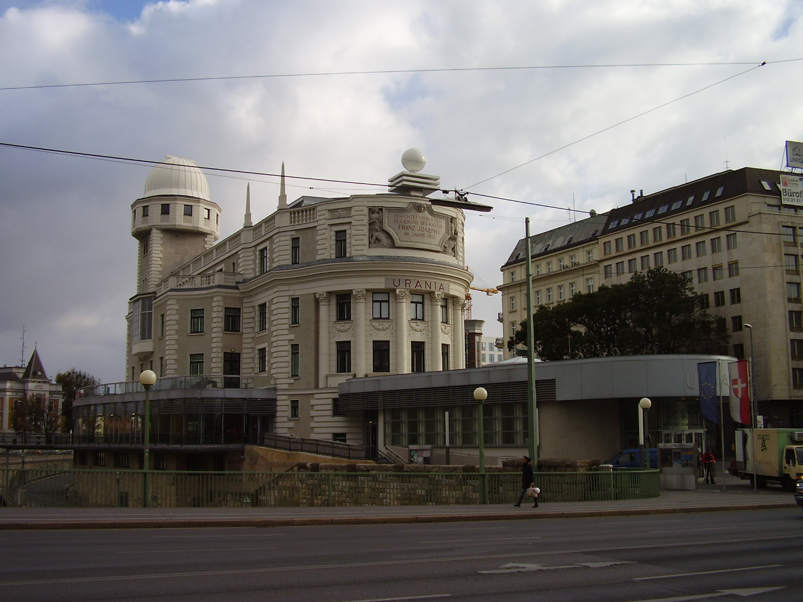 Urania, Vienna